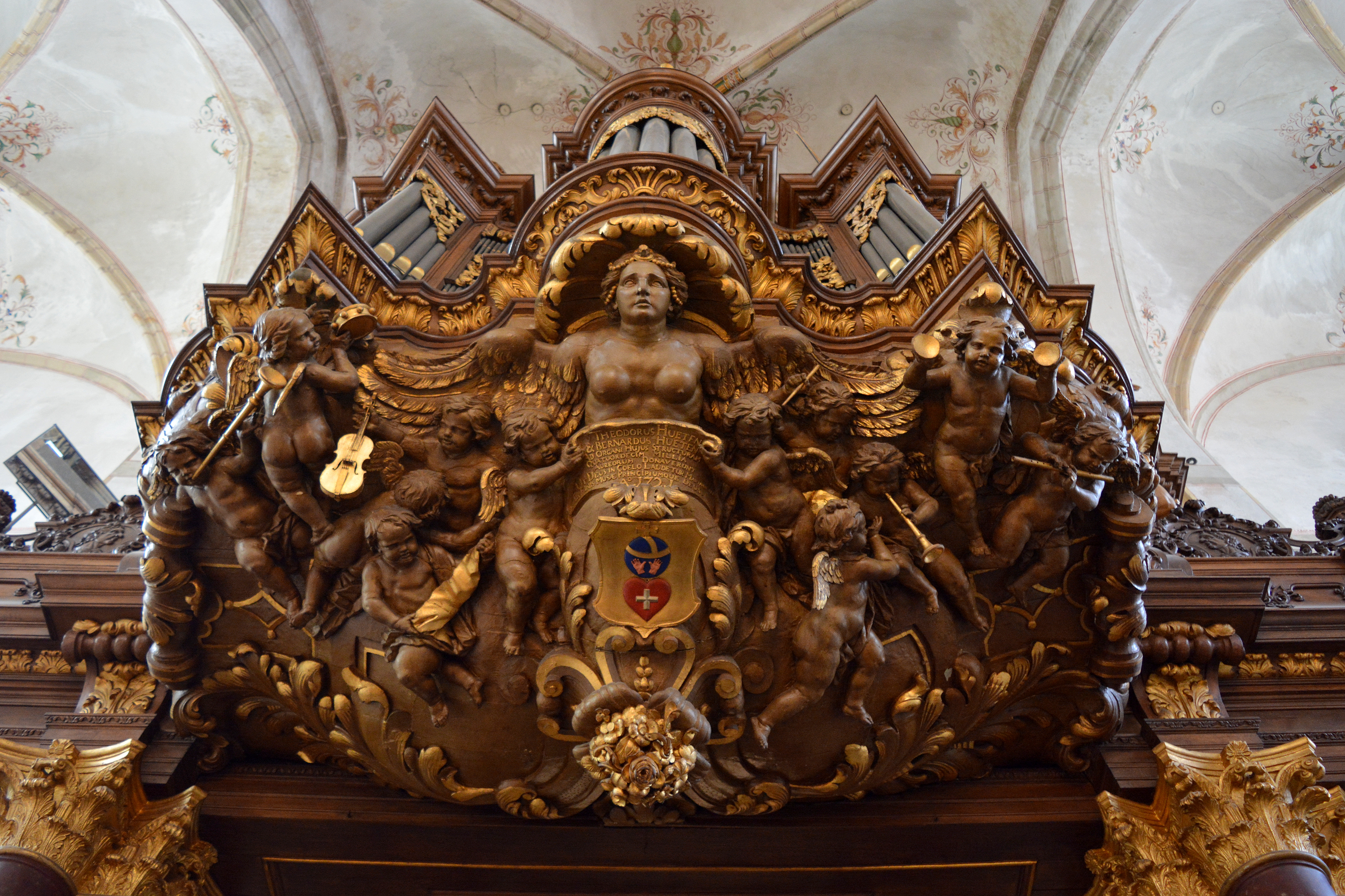 Grote Kerk, Zwolle, detail orgel